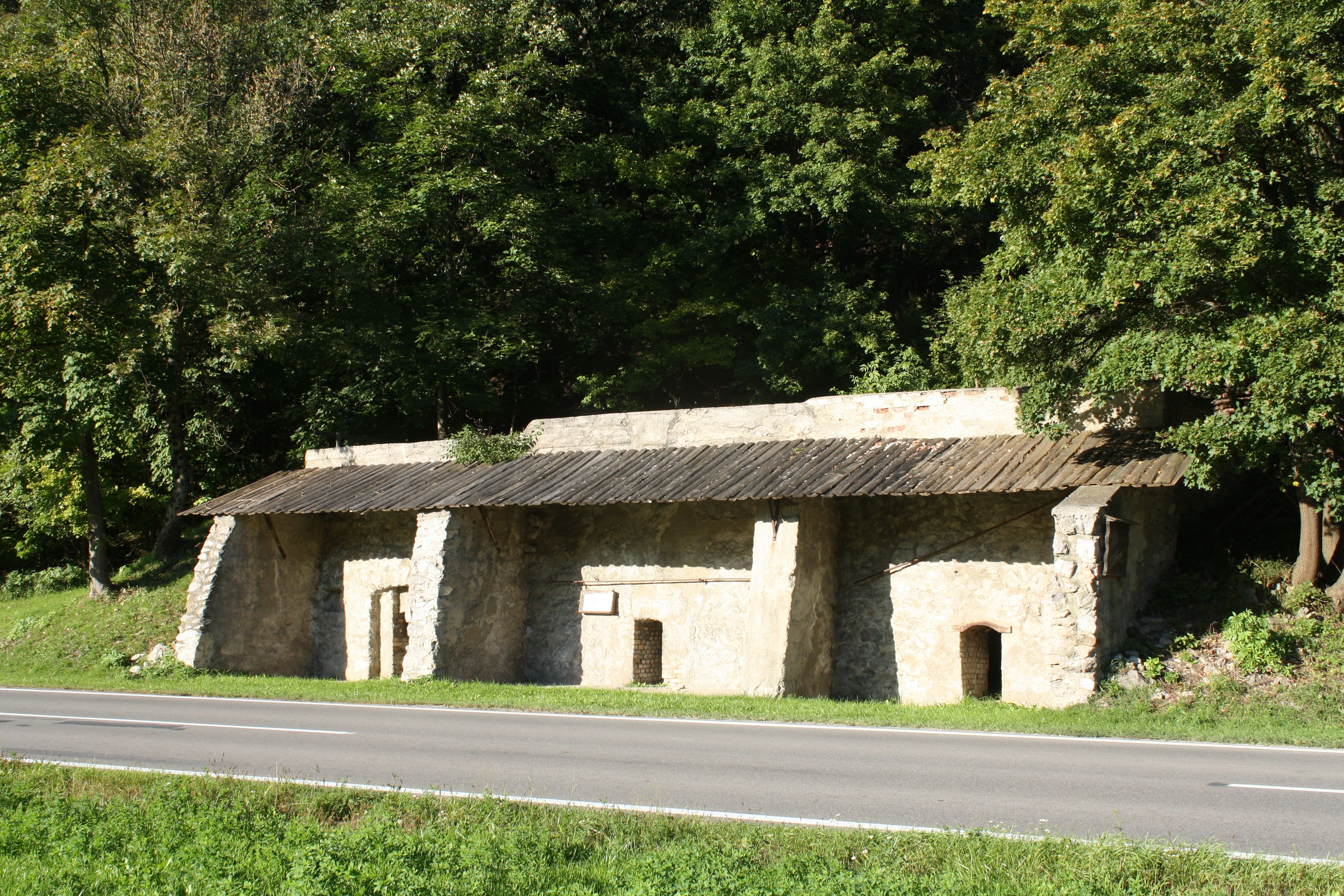 Kalkofen im Helenental bei Sattelbach in Niederösterreich